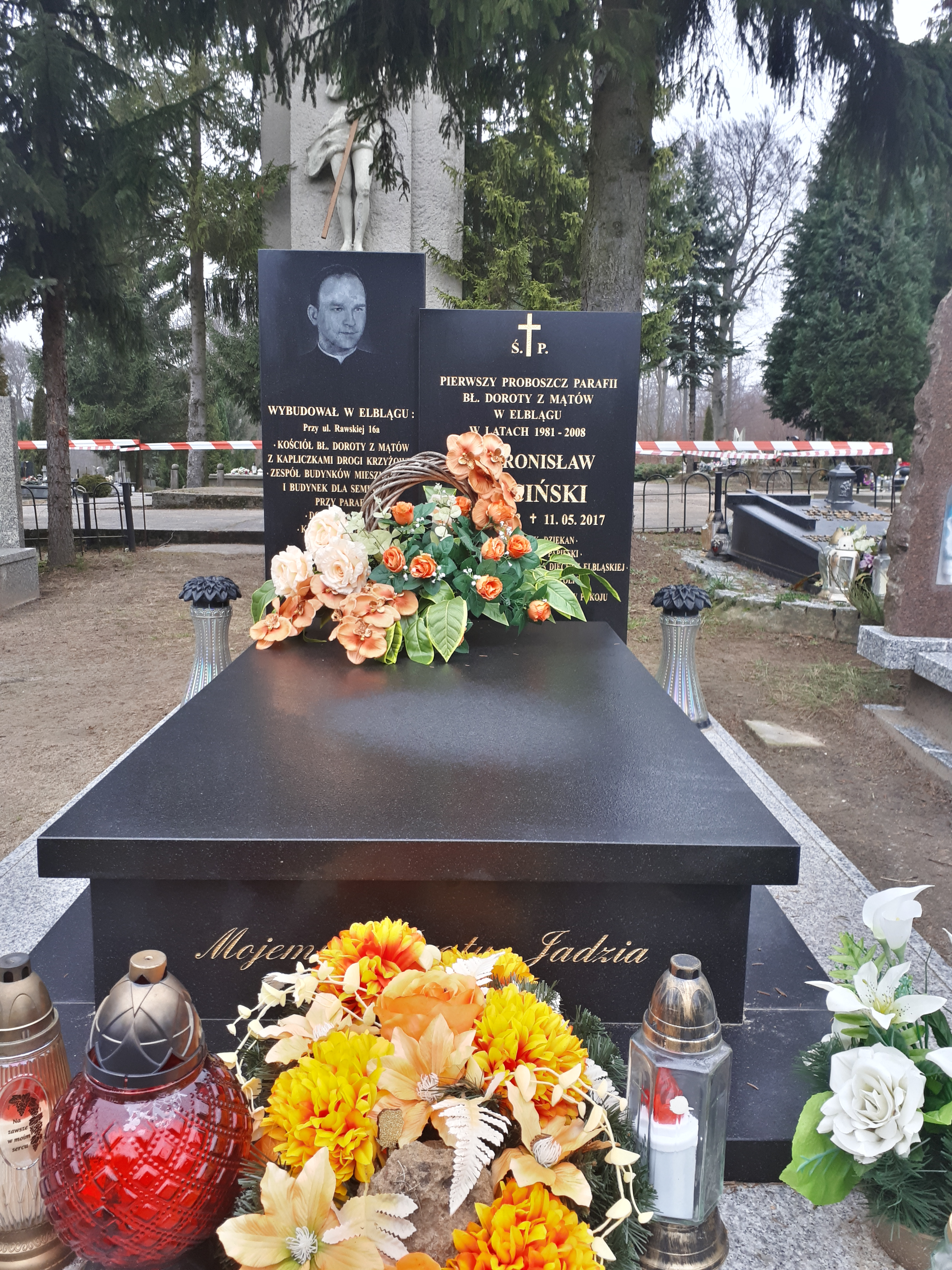 Grób ks. prałata Bronisława Trzcińskiego w kwaterze księży na cmentarzu komunalnym Dębica, styczeń 2020